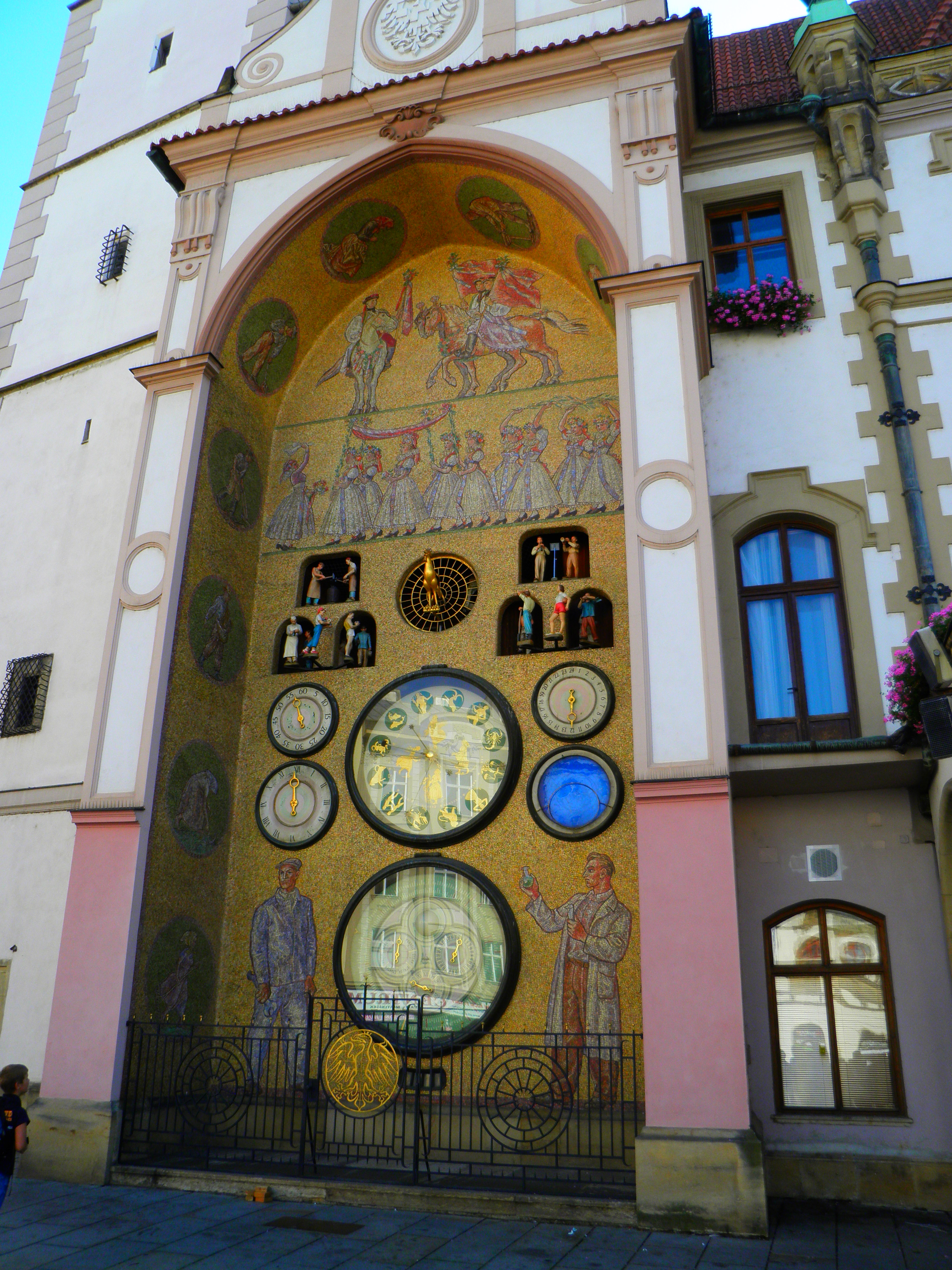 Magistrát města Olomouce